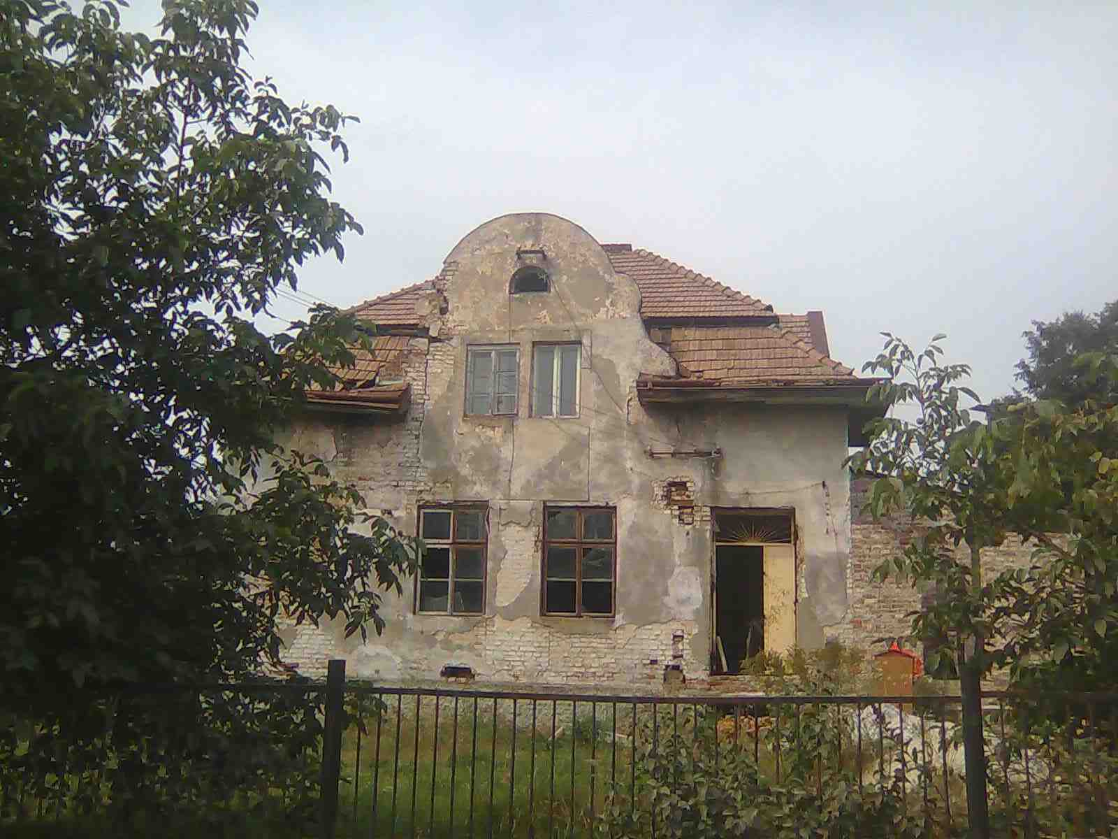 Стара пошта у селі Зимна Вода (Львівська область).